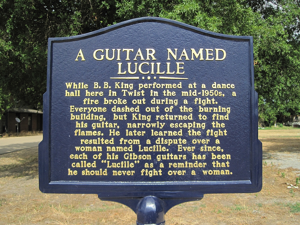 Twist, Arkansas. BB King marker